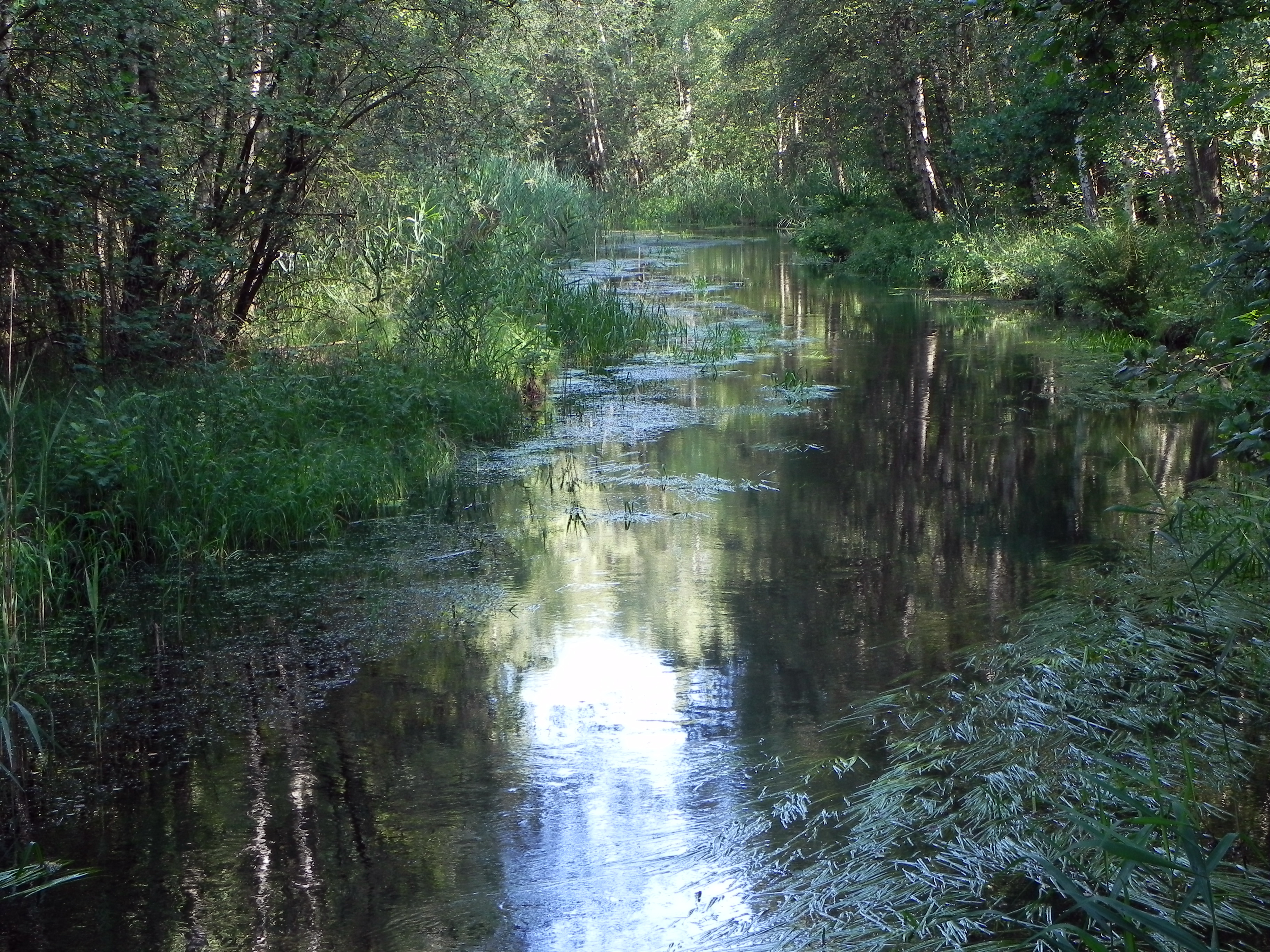 Örtze bei Breloh (nördlich von Munster), Niedersachsen, Germany